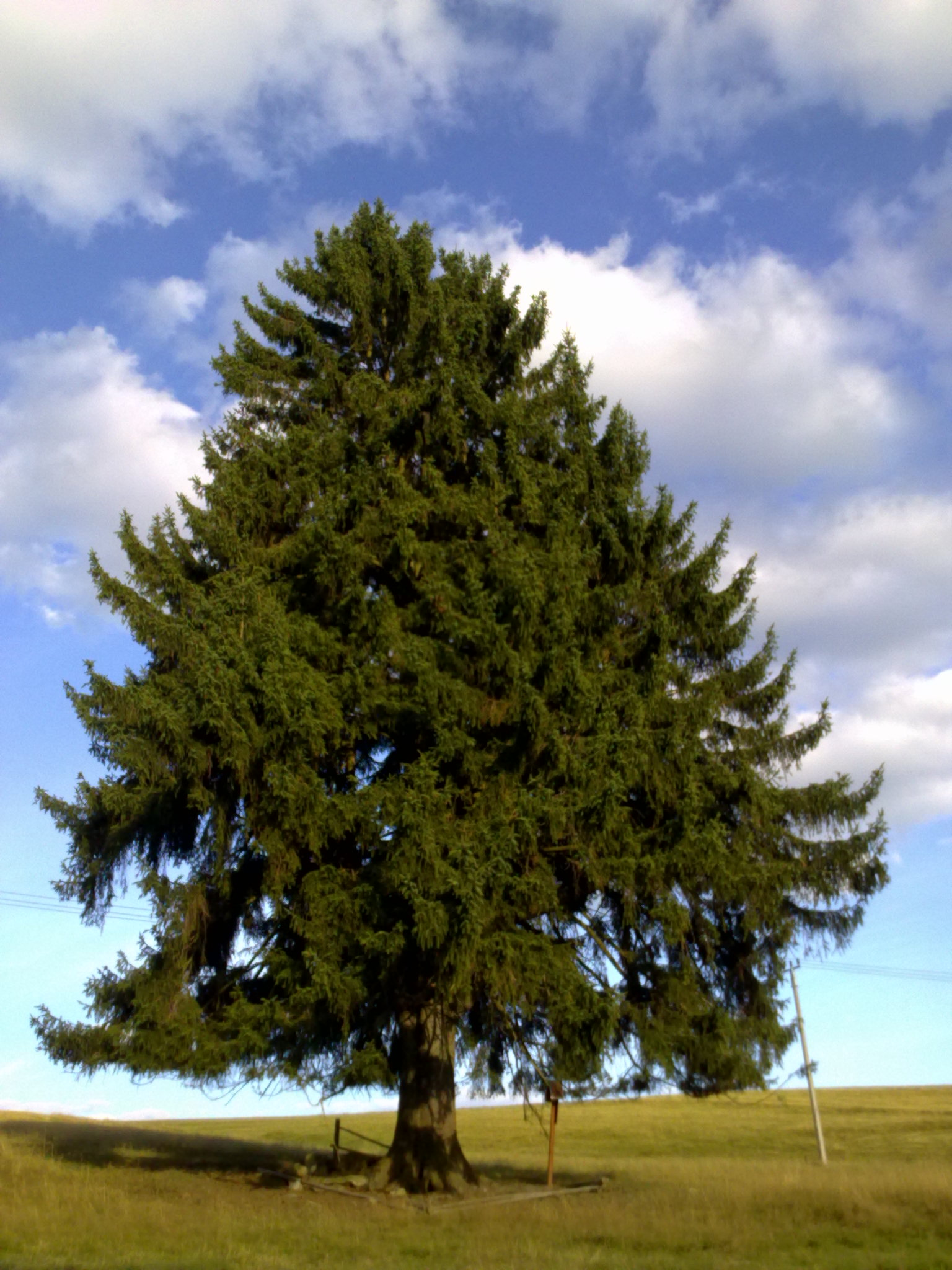 Smrk pod Ovčím vrchem. Památný strom v katastru obce Tři Sekery. Rok 2012.